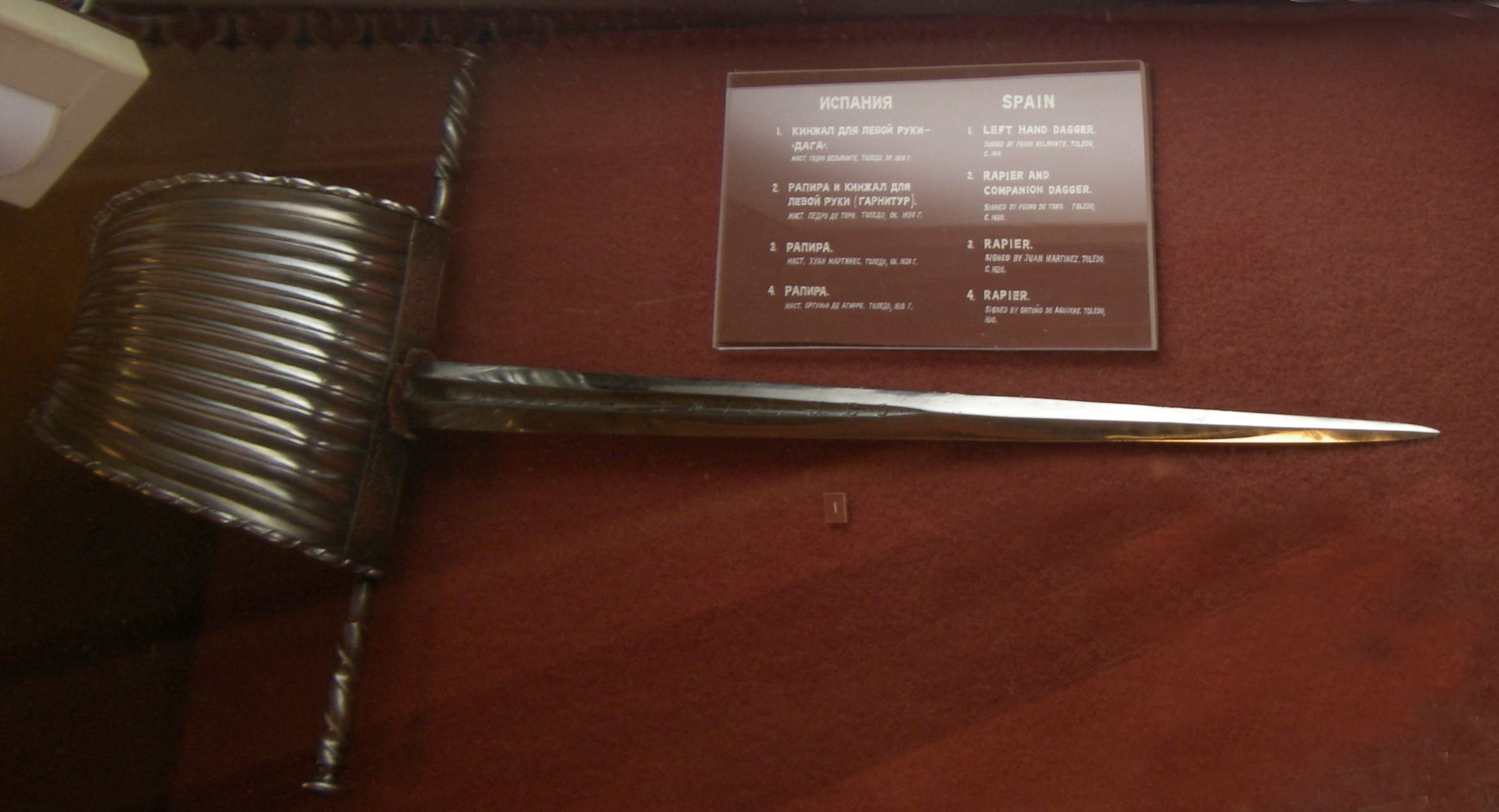 Кинжал для левой руки «Дага», маст. Педро Вельмонте, Толедо, ок. 1610 г. Эрмитаж, Санкт-Петербург // edited from Image-Дага 1610 (общий вид 1) original.jpg